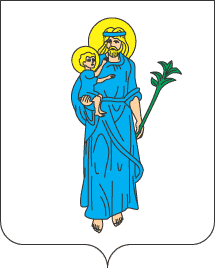 Herb miasta Mikulińce